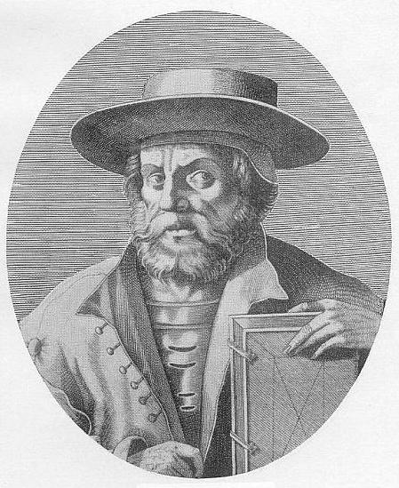 Manuel Chrysoloras (1350–1415), byzantinischer Philologe. Stich von N. L'Armessin (aus Bullart, Académie des sciences 1862 Bd. I 265.